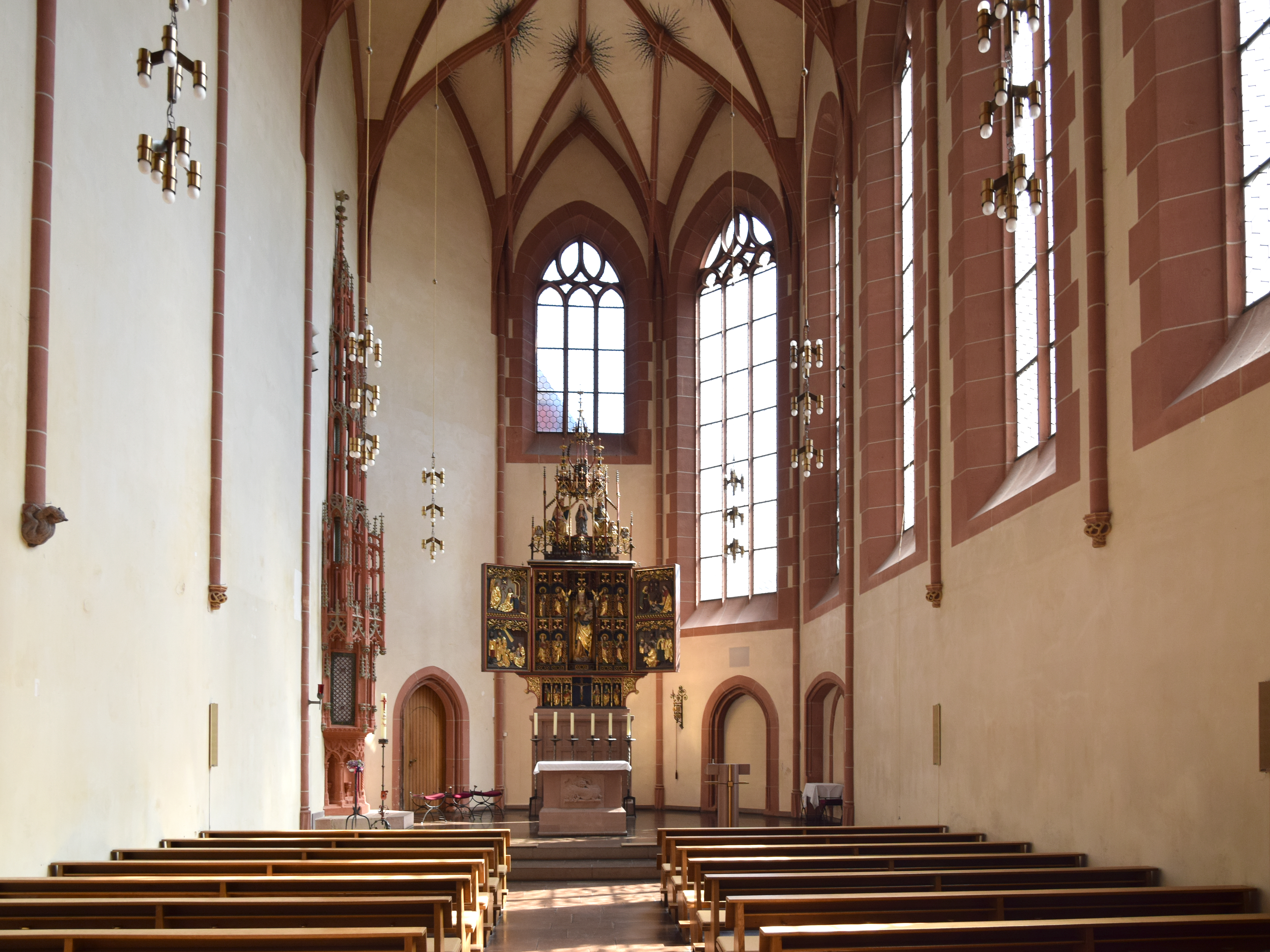 Interieur von St. Johannes Evangelist ("Kugelkirche") in Marburg